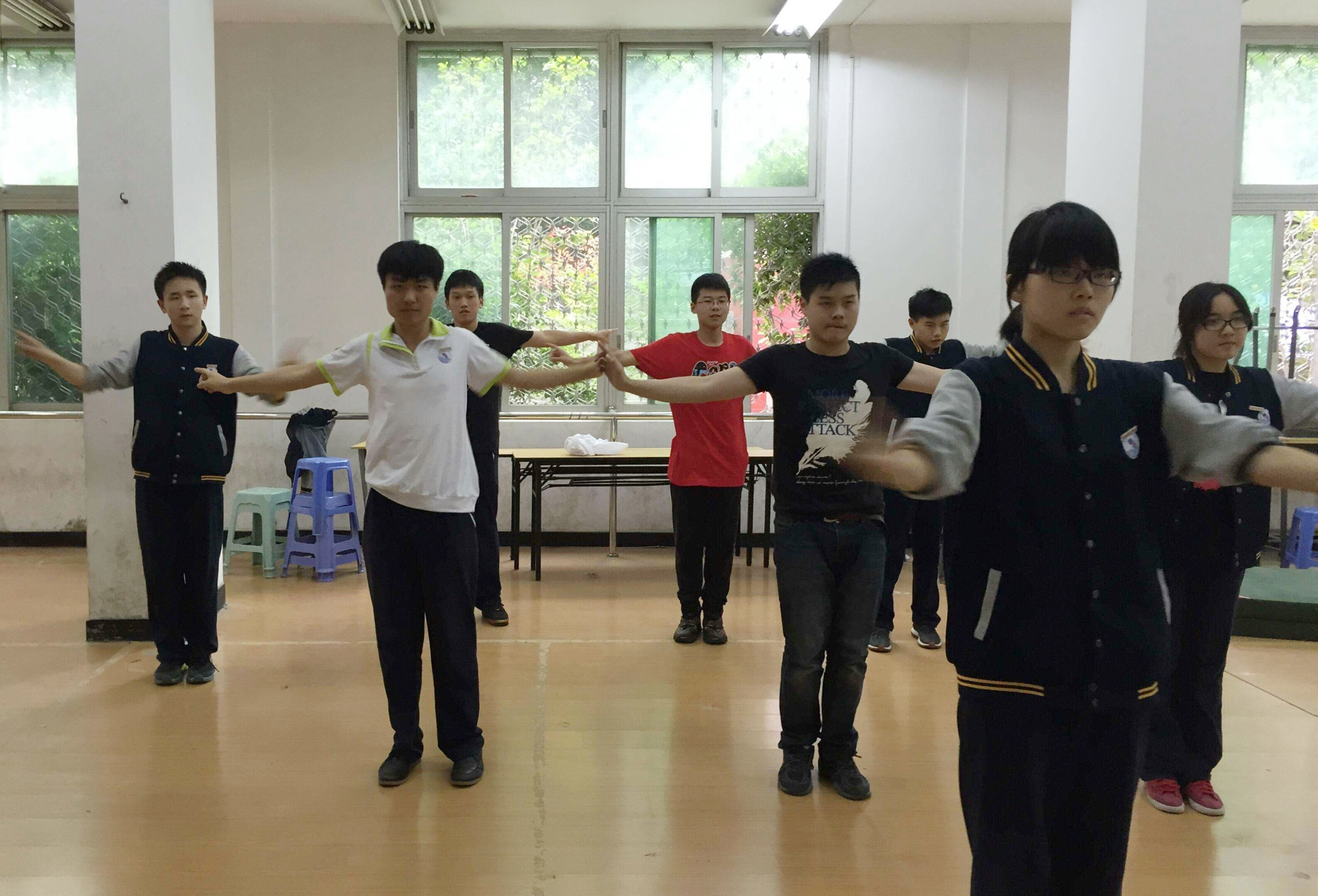 福州三中无戒动漫社每周有一天在体操房进行宅舞教学和练习。图上是正在练习Calc.